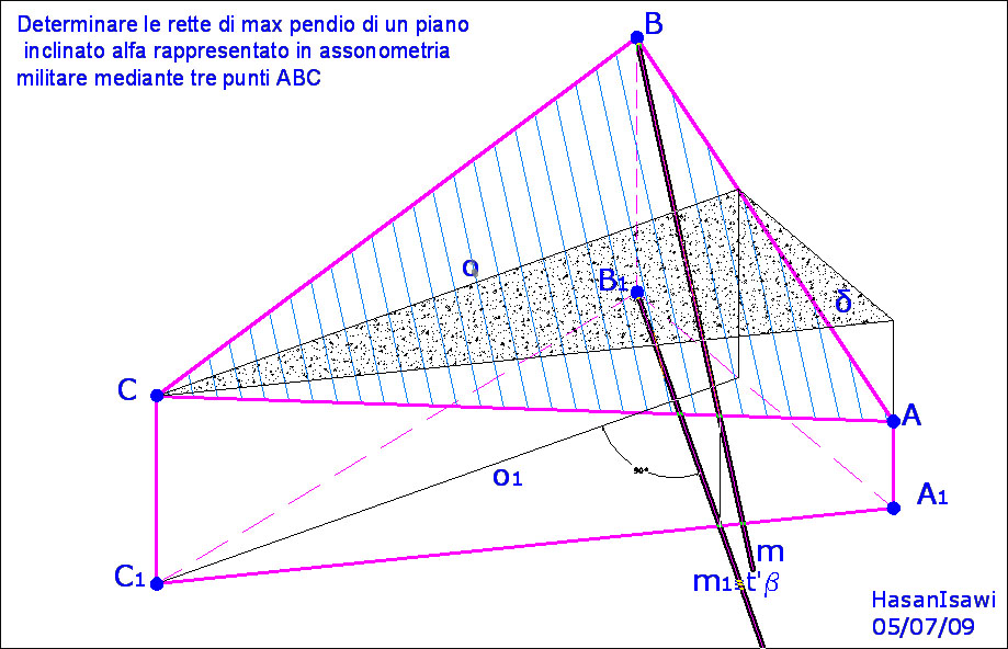 esercizi di geometria descrittiva determinazione delle rette di max pendio di un piano inclinato alfa. تحديد خطوط اقصى انحدار لسطح مائل الفا ممثل في الاسقاط الاكسنومتري عن طريق ثلاثة نقط